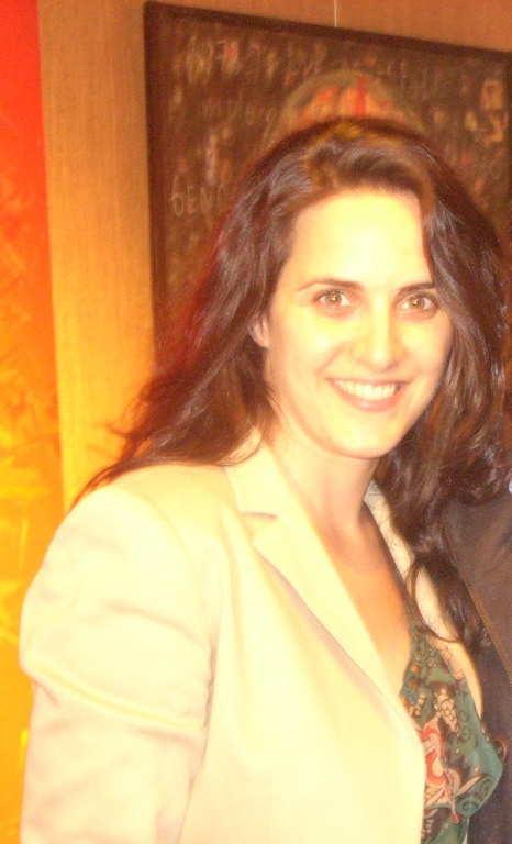 Imagen recortada de Julieta Díaz.